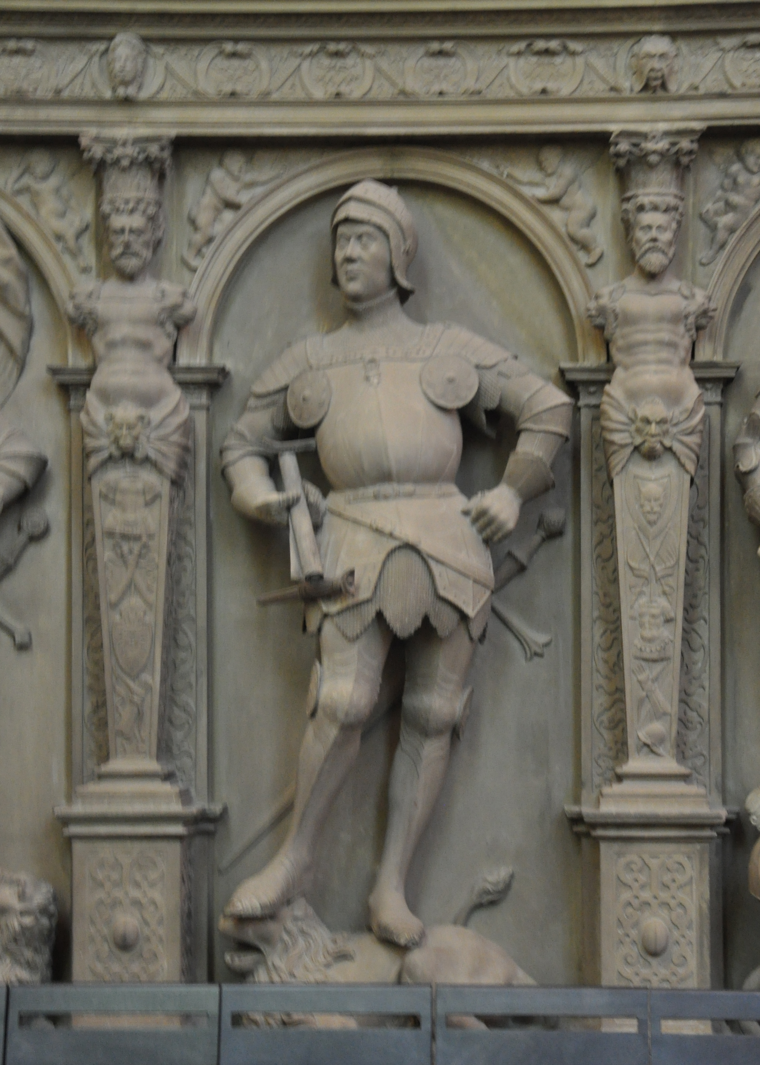 Stuttgart, Chor der Stiftskirche, Grafenstandbilder von Sem Schlör (ab 1576 entstanden zum Ersatz der ursprünglichen Epitaphe der in der Stiftskirche beigesetzten Grafen von Württemberg) Figur 9: Eberhard IV. der Jüngere († 1419)